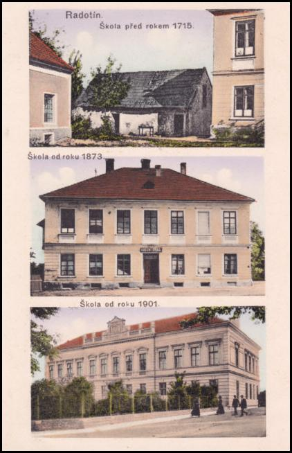 Radotín, obecné školy